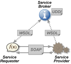 Web ser Веб-служба